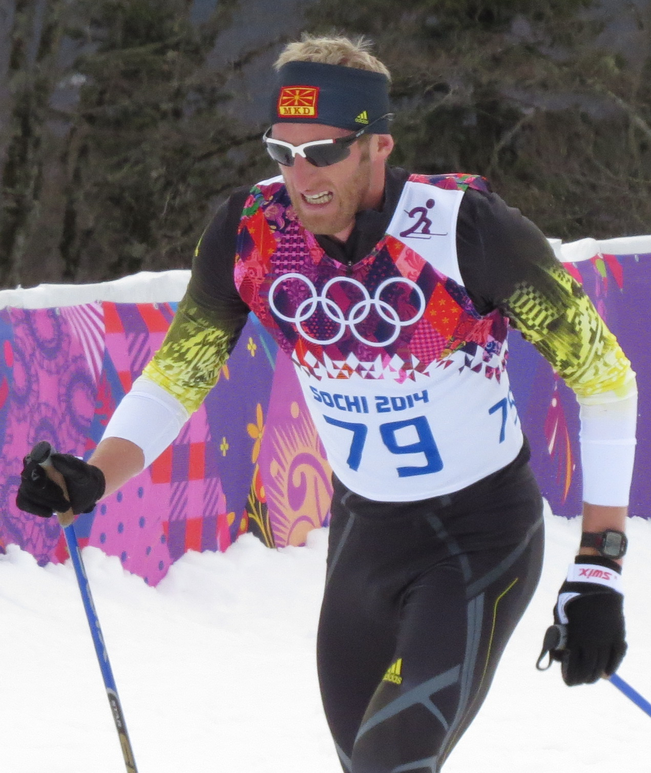 Лыжные гонки на зимних Олимпийских играх 2014 — 15 км классическим стилем (мужчины)